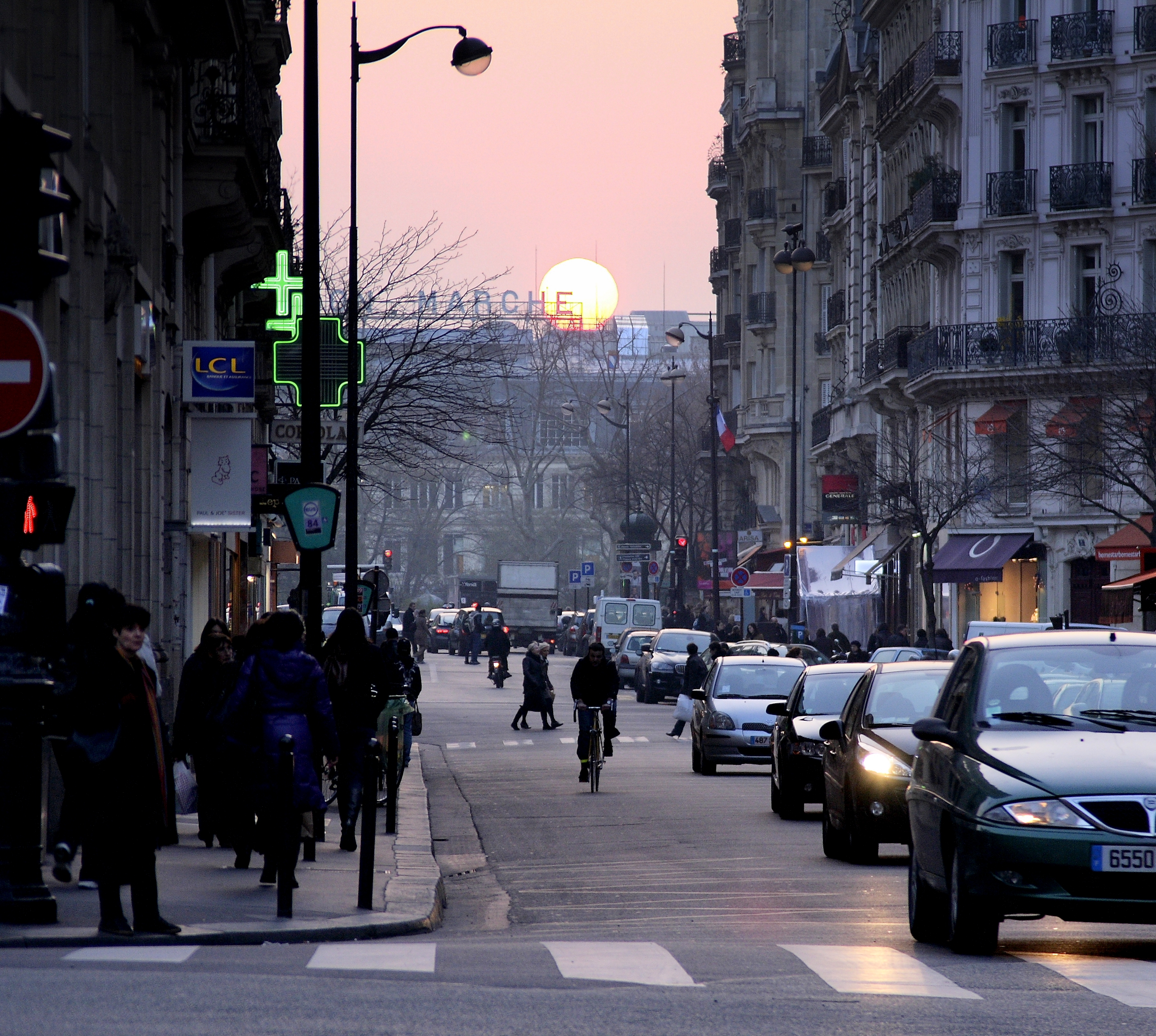 Rue du Four (Paris)